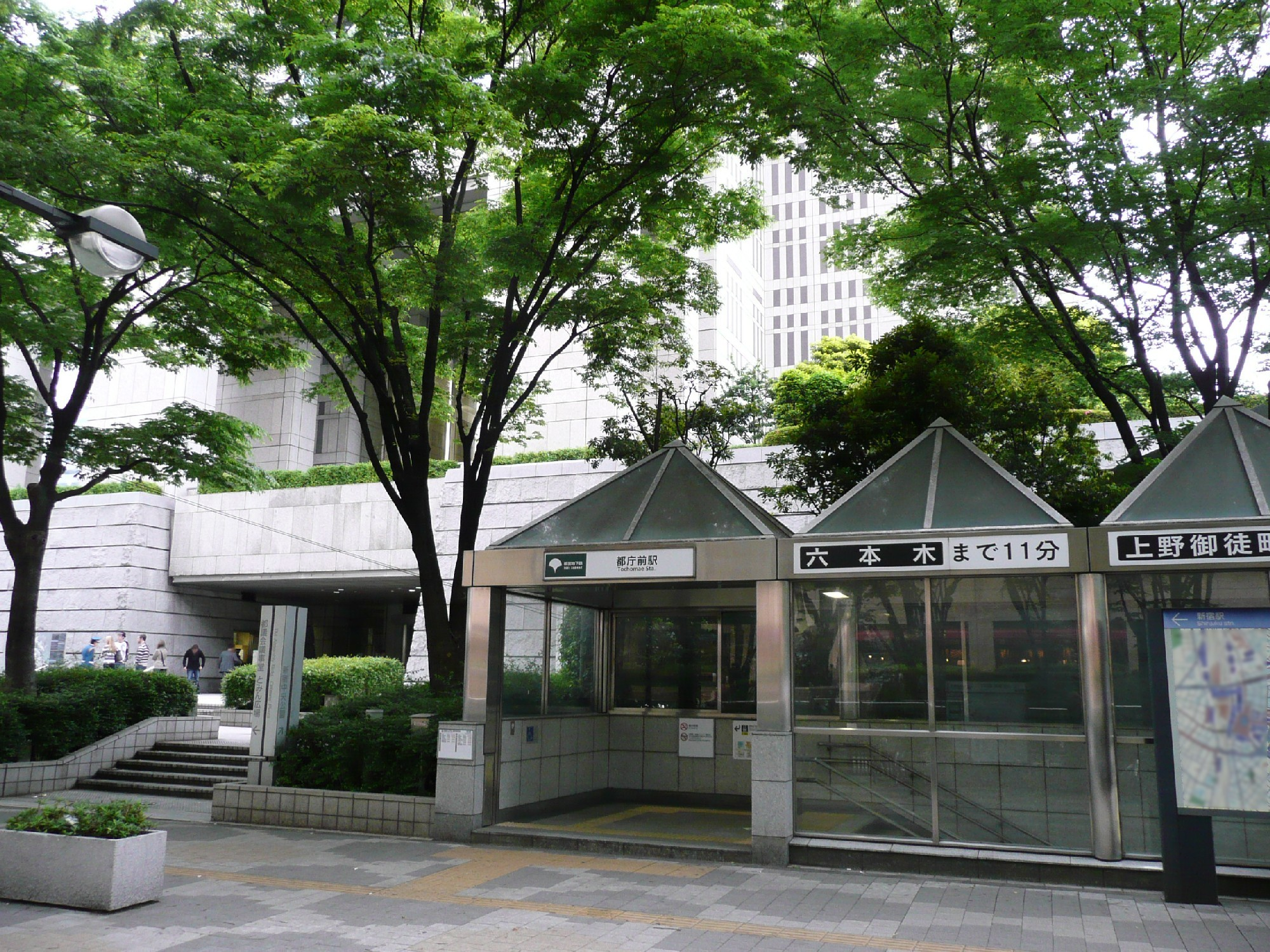 都庁前駅A4出入口。背後の建物は東京都庁。